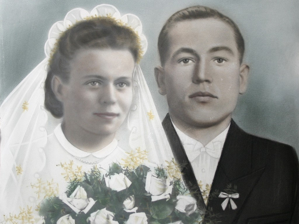 Zdjęcie monidła z roku 1947 wykonane ze zdjęć. Monidło przedstawia małżonków Jana i Lidię Główczewskich.